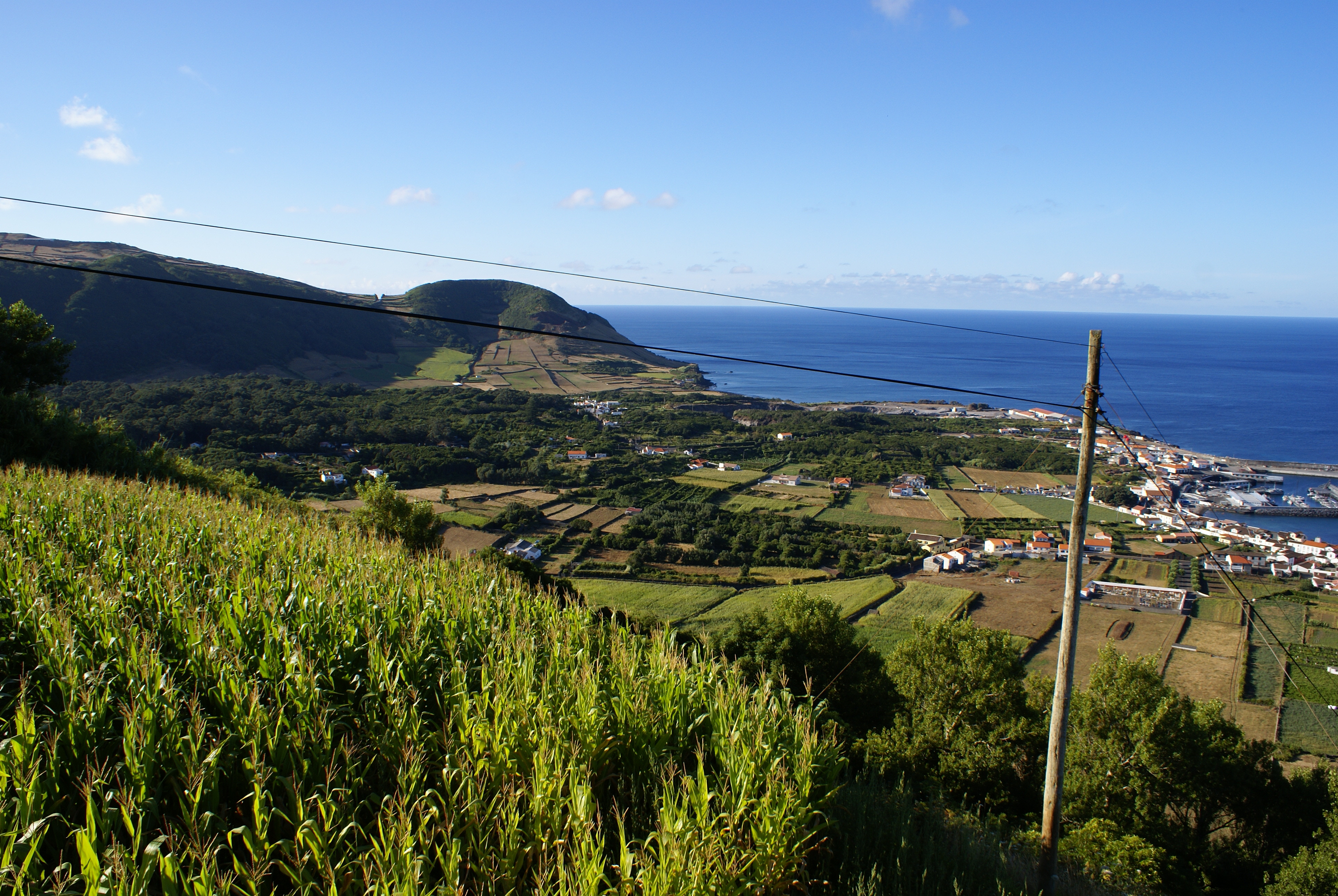 Vista parcial da Vila da Praia a partir do adro da Ermida de Nossa Senhora da Saúde. Vila da Praia, ilha Graciosa, Açores, Portugal.